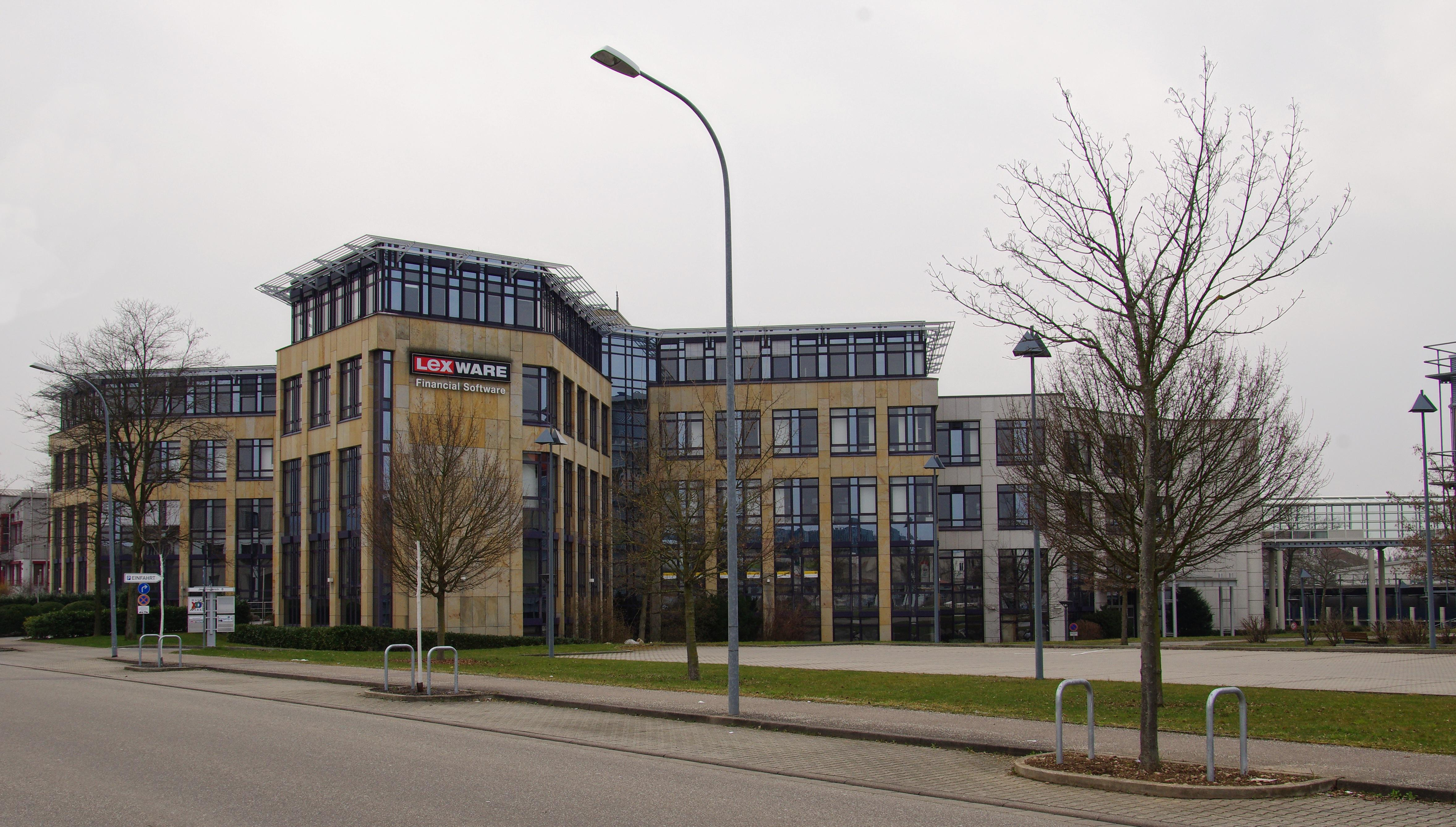 Der Haid-Park mit mehreren Firmen